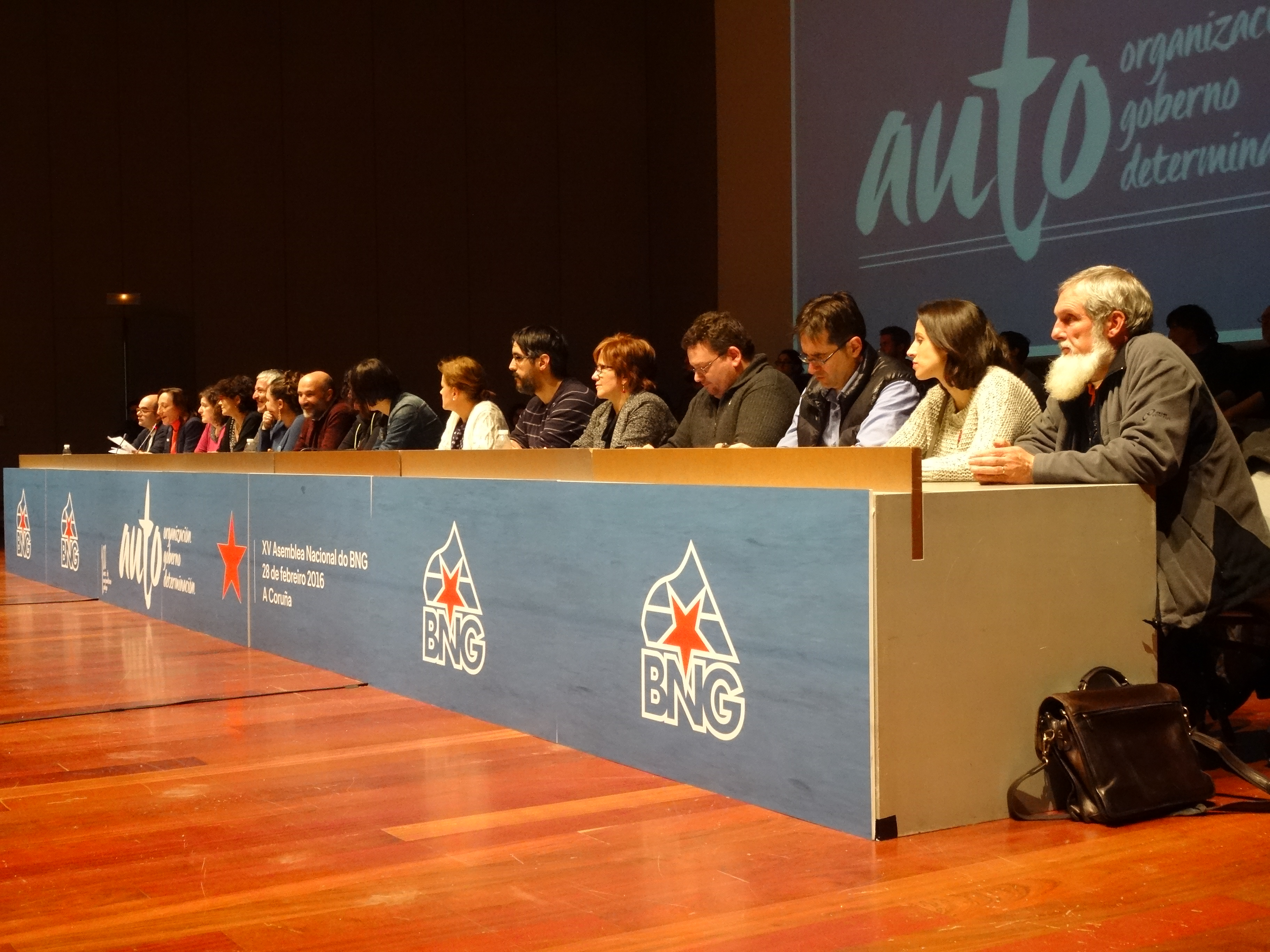 Ver título.